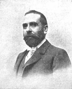 Juan Montilla, fiscal del Tribunal Supremo. Fotografía de Christian Franzen.